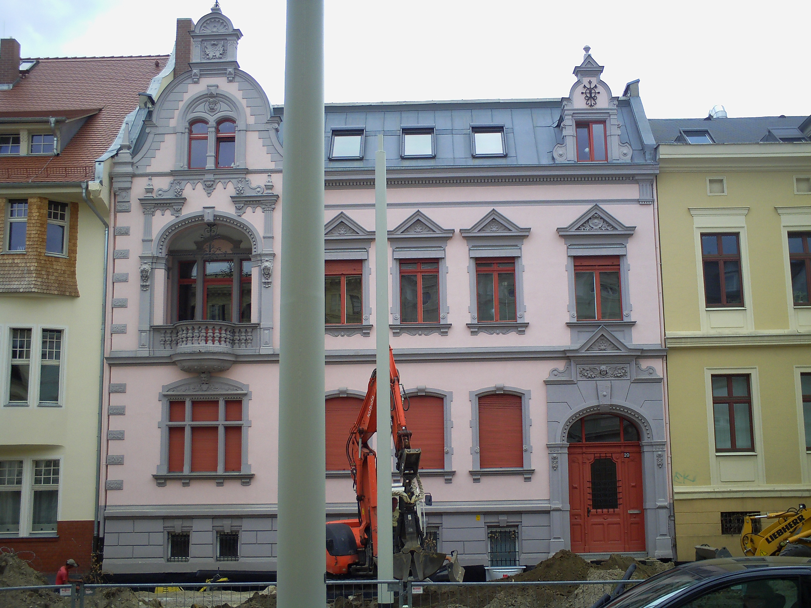 Bahnhofstraße 20 in Cottbus